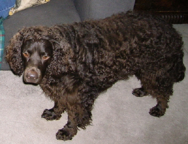 Chien d'eau americain